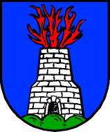 Gemeinde Thomatal: Im blauen Schild auf grünem Dreiberg ein silberner, runder Schmelzofen, aus dem oben drei Flammen lodern